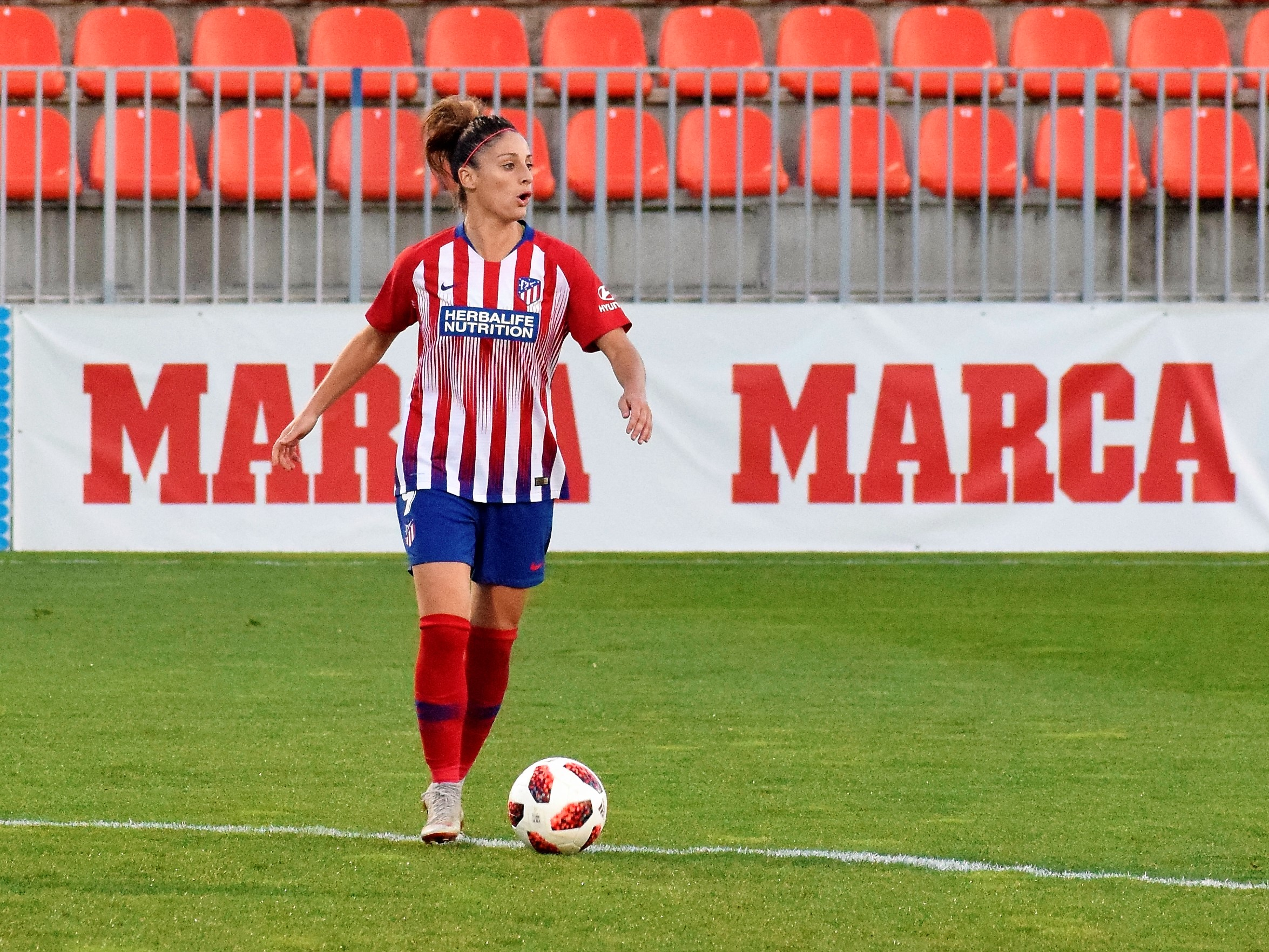 Esther González jugando con el Atlético de Madrid